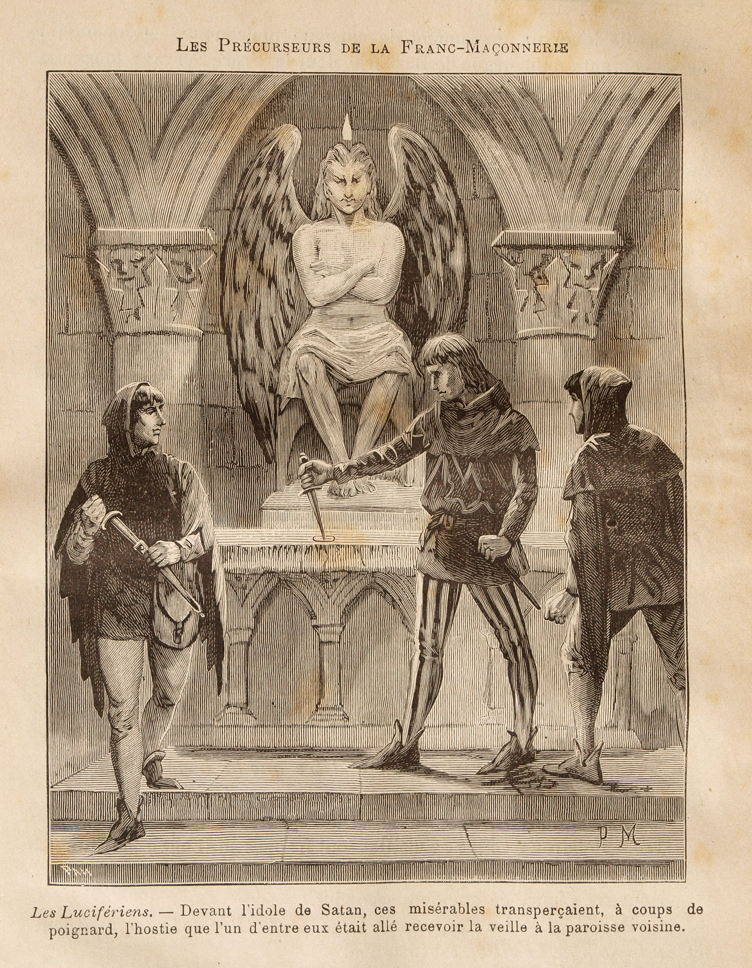 Une des gravures du document de Léo Taxil, Les Mystères de la Franc-Maçonnerie, Paris, 1886.